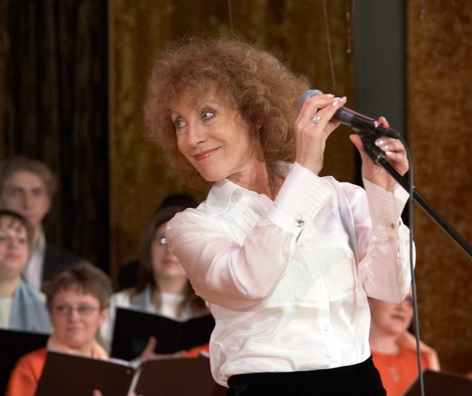 Alicja Majewska